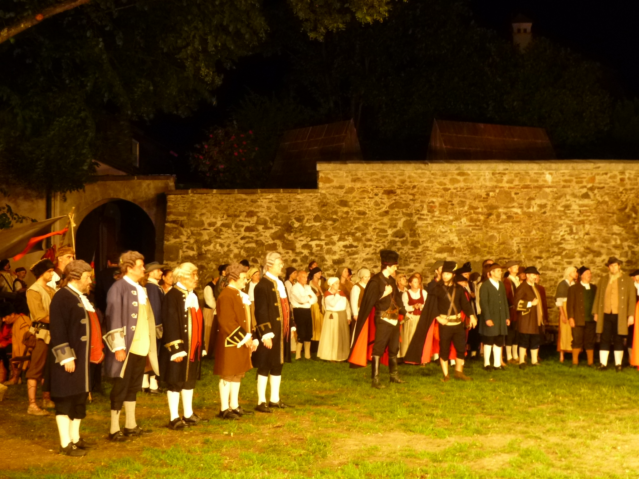 "Trenck der Pandur", historisches Festspiel in der Stadt Waldmünchen, Oberpfalz